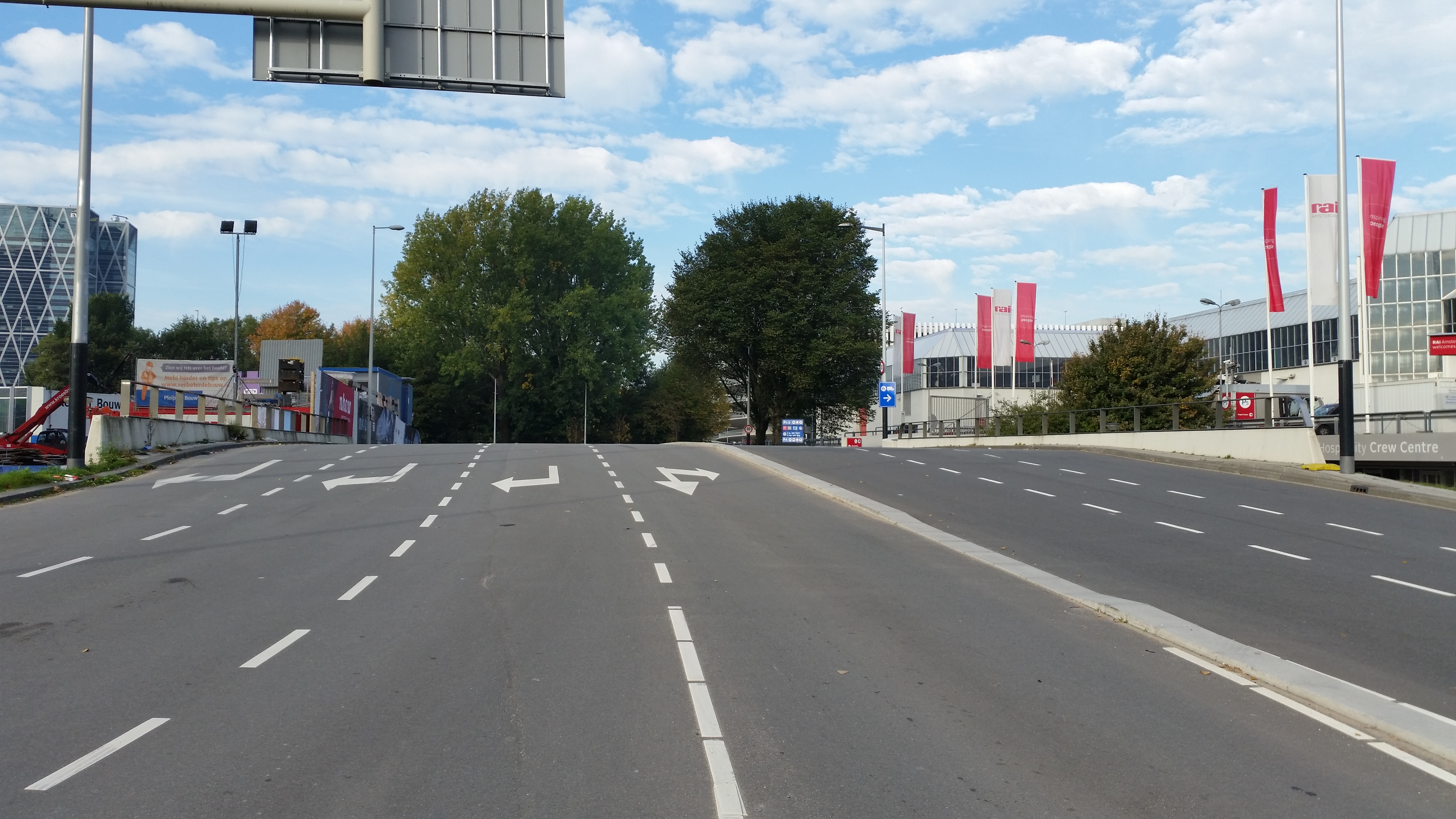 Brug 856 (in Amsterdam), overzicht bovenweg